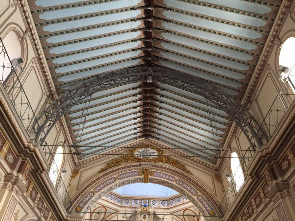 St. Maria Kilisesi iç çatı detayı